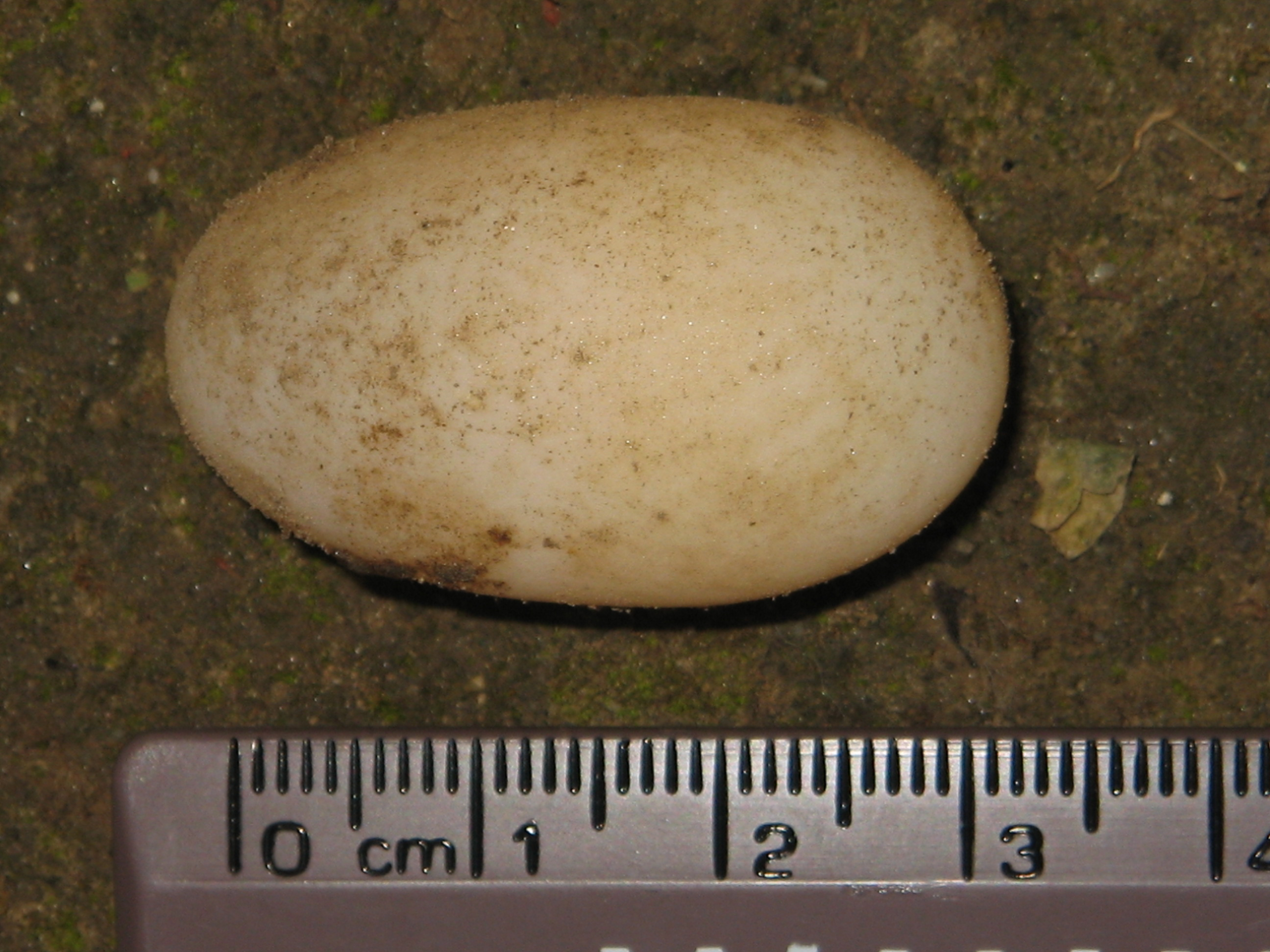 trachemys scripta elegans' egg